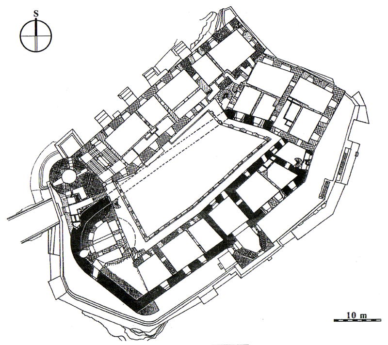 Beschreibung: Orlík nad Vltavou. Grundriss des ersten Obergeschosses der Burg mit Eintrag der Bauphasen. Schwarz - älteste Bauphase mit dem ursprünglich angenommenen Verlauf der nördlichen Burgmauer (gestrichelt); weiß gekörnt - gotische Umbauten des 14. und beginnenden 15. Jahrhunderts in der Nordecke und der Kapelle; dicht kreuzschraffiert - Befestigung aus der Zeit der Zmrzlík von Svojšín (ca. 1420-1440); dünn kreuzschraffiert - erster Umbau unter den Herren von Švamberk nach 1514; schraffiert - Umbauten des Barock; gepunktet - Umbauten des 19. und 20. Jahrhundert.*Quelle: Grabolle/Hrubý/Militký 2002, 112 Abb. 15, leicht überarbeitet nach Varhaník 1998, 18 Abb. 8; *Lizenzstatus: GNU FDL. Kategorie:Bild:Burg